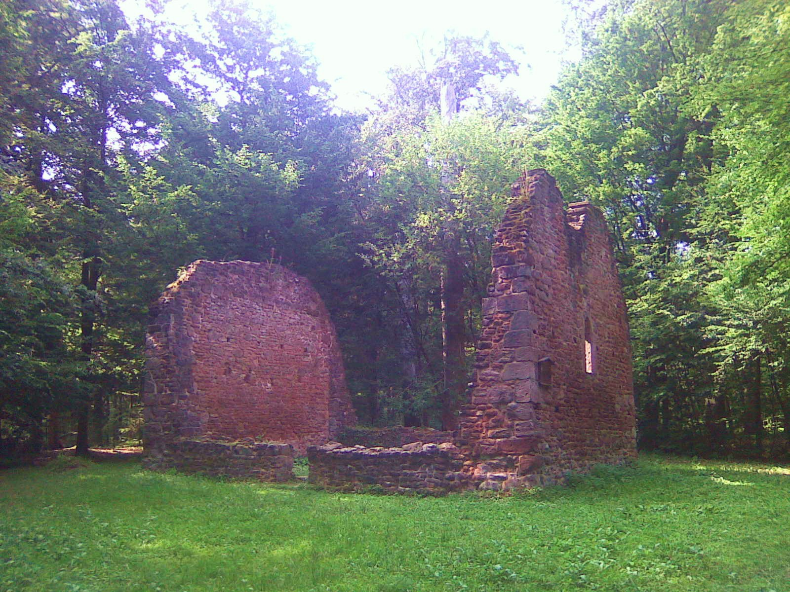 Ruine der Kirche der Wüstung Leisenberg nahe Gillersheim.